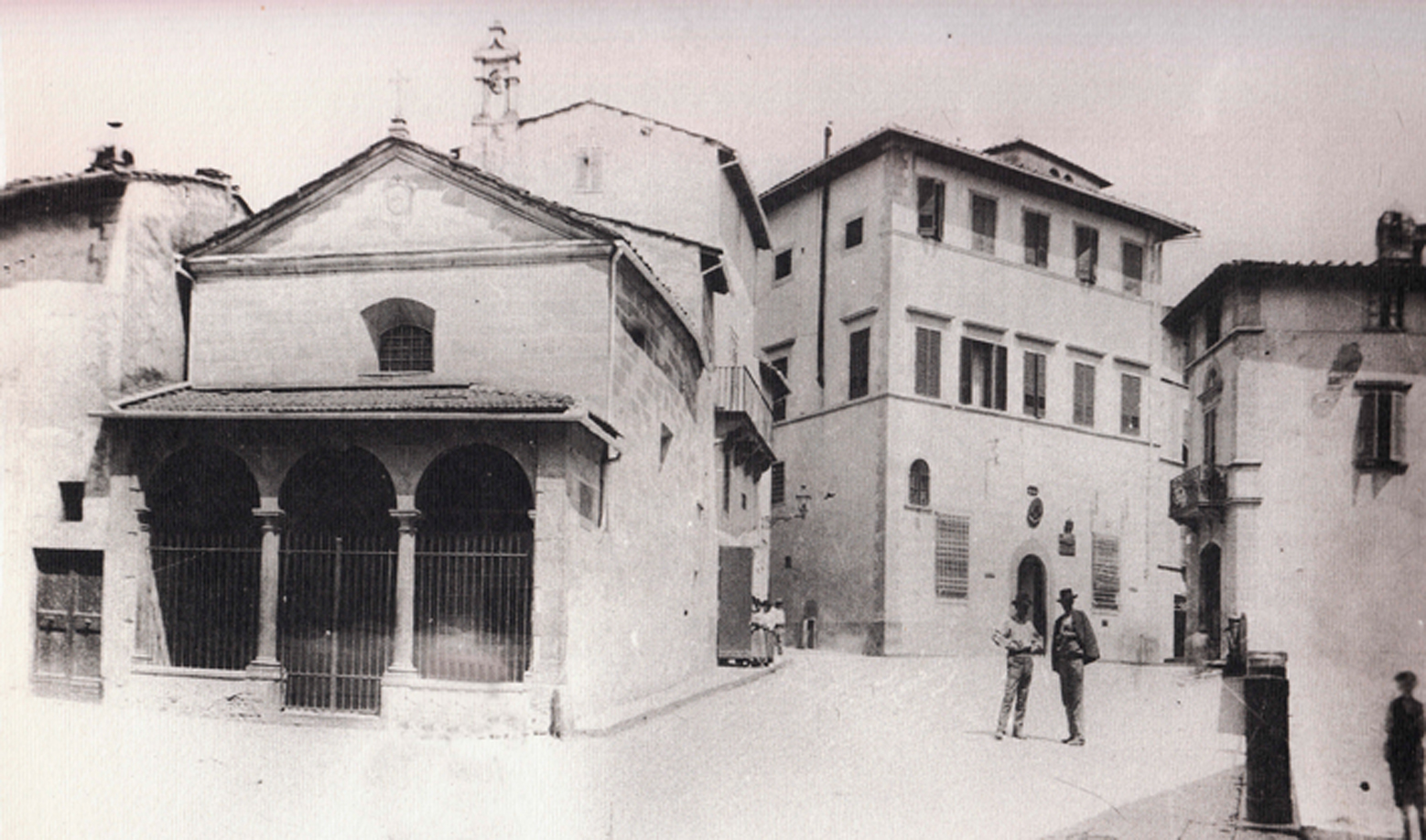 Oratorio della Concezione (San Casciano in Val di Pesa)